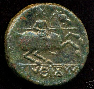 Moneda celtíbera encontrada en Contrebia Cárbica, Cuenca, España (reverso)